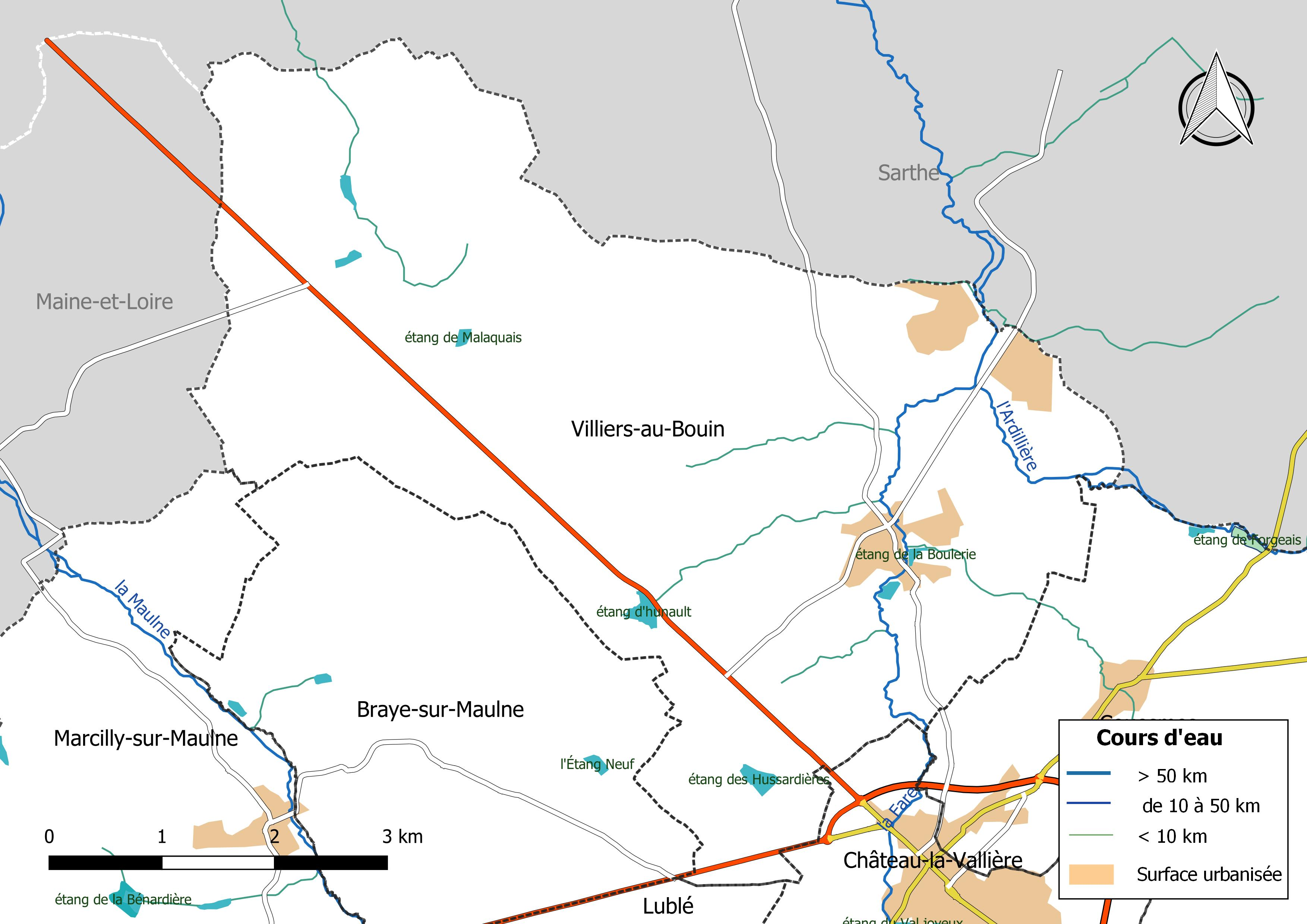 Carte du réseau hydrographique de la commune de Villiers-au-Bouin (France).